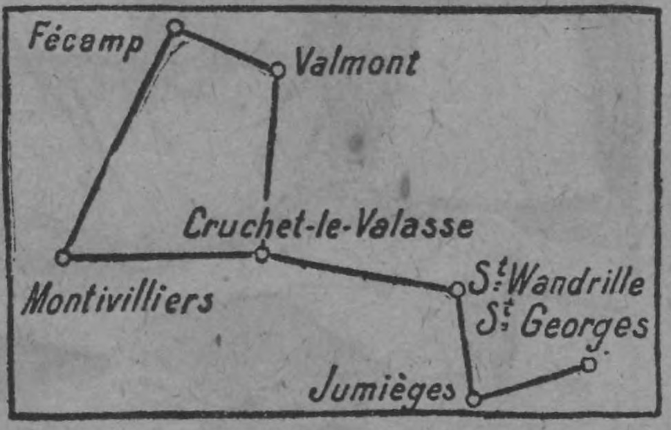 ajouté pour wikisource